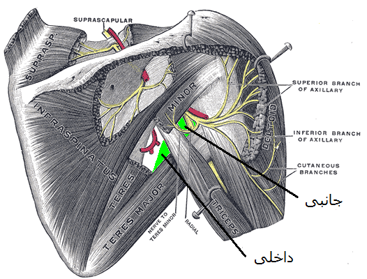 فضاهای آگزیلا